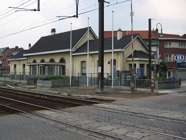 Station van Kapellen langs spoorlijn 12 (Antwerpen-Essen-Roosendaal)